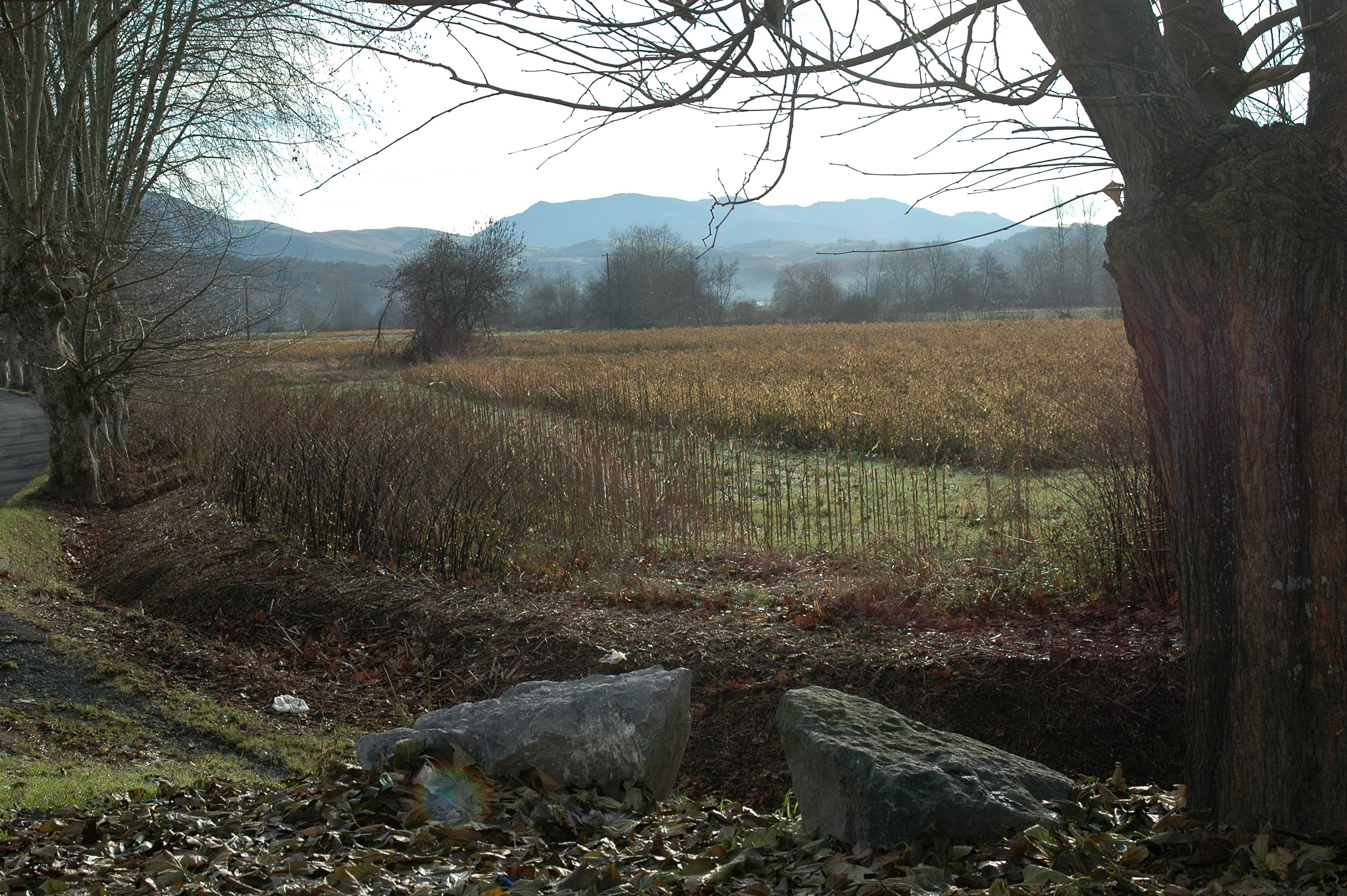 Ustaritz, plaine maïsicole. Photo prise le 31/12/06 par Harrieta171